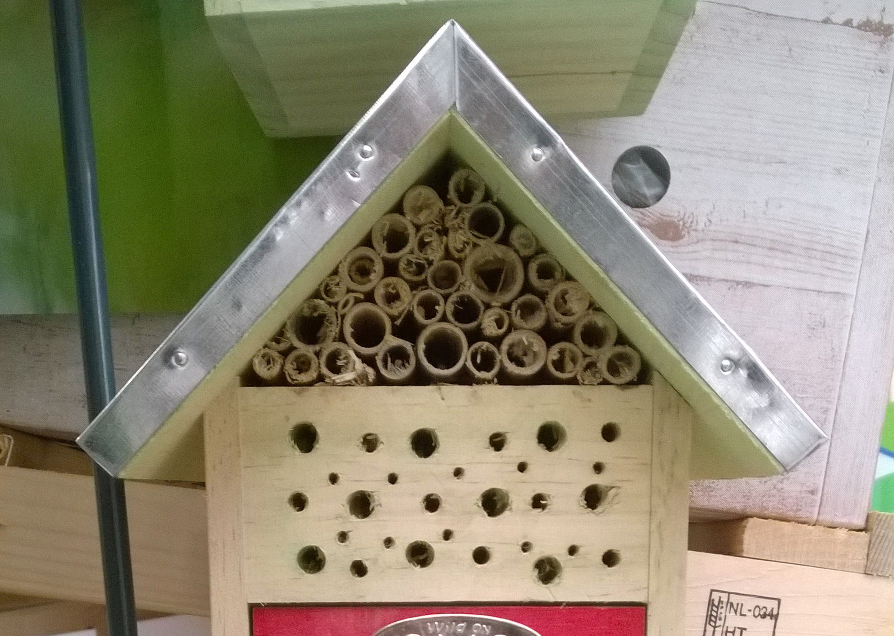 Marienkäferkasten oder box wird nie von Marienkäfer genutzt